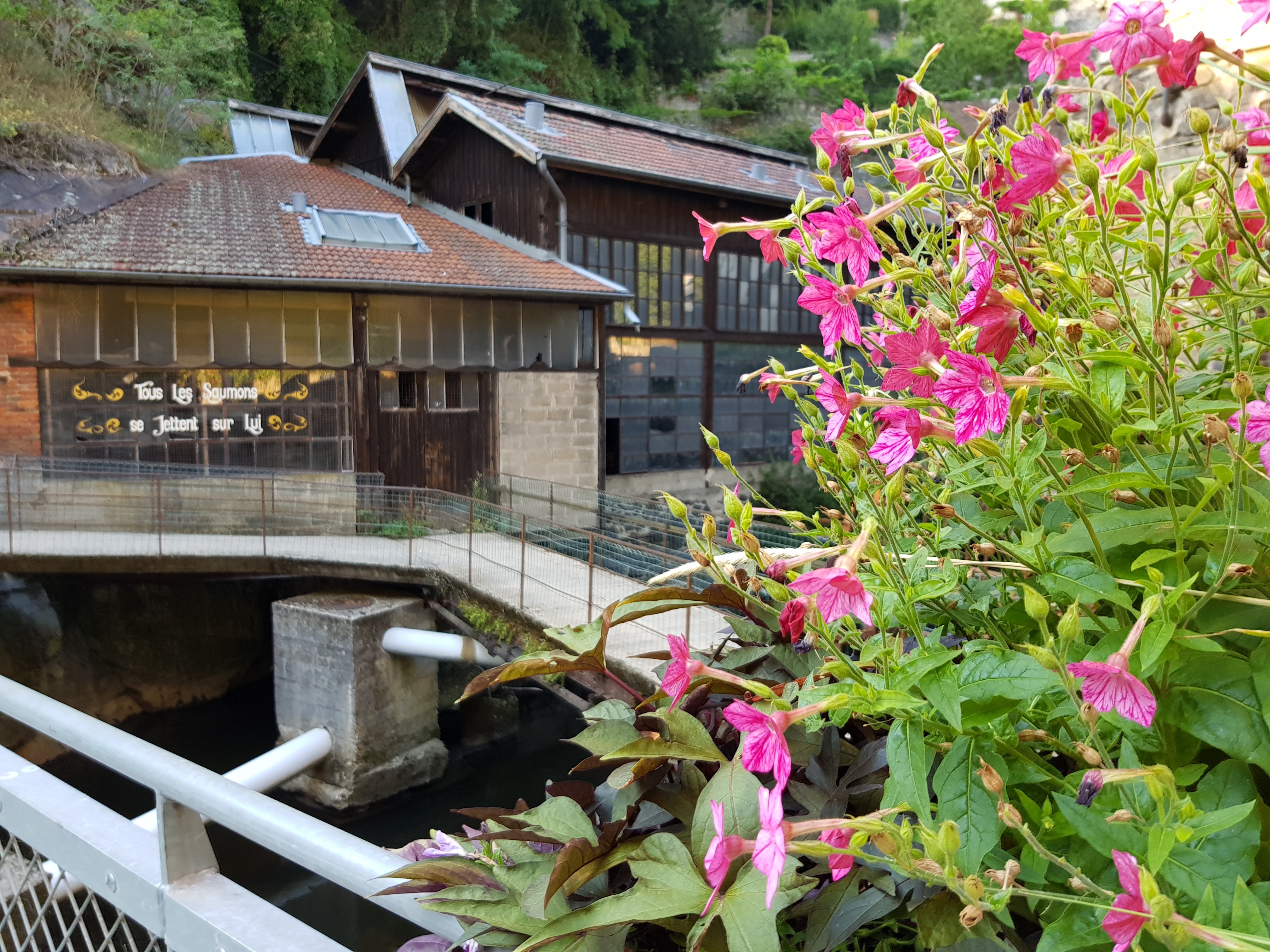 Les anciennes forges Mondière